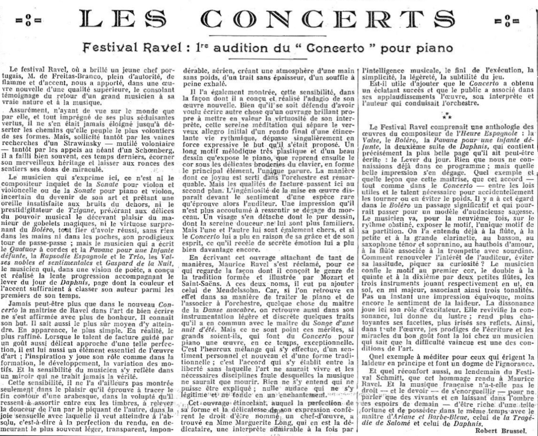 Critique parue dans le Figaro le 18 janvier 1932 suite au Festival Ravel du 14 janvier précédent, au cours duquel fut créé le Concerto en sol majeur de Maurice Ravel